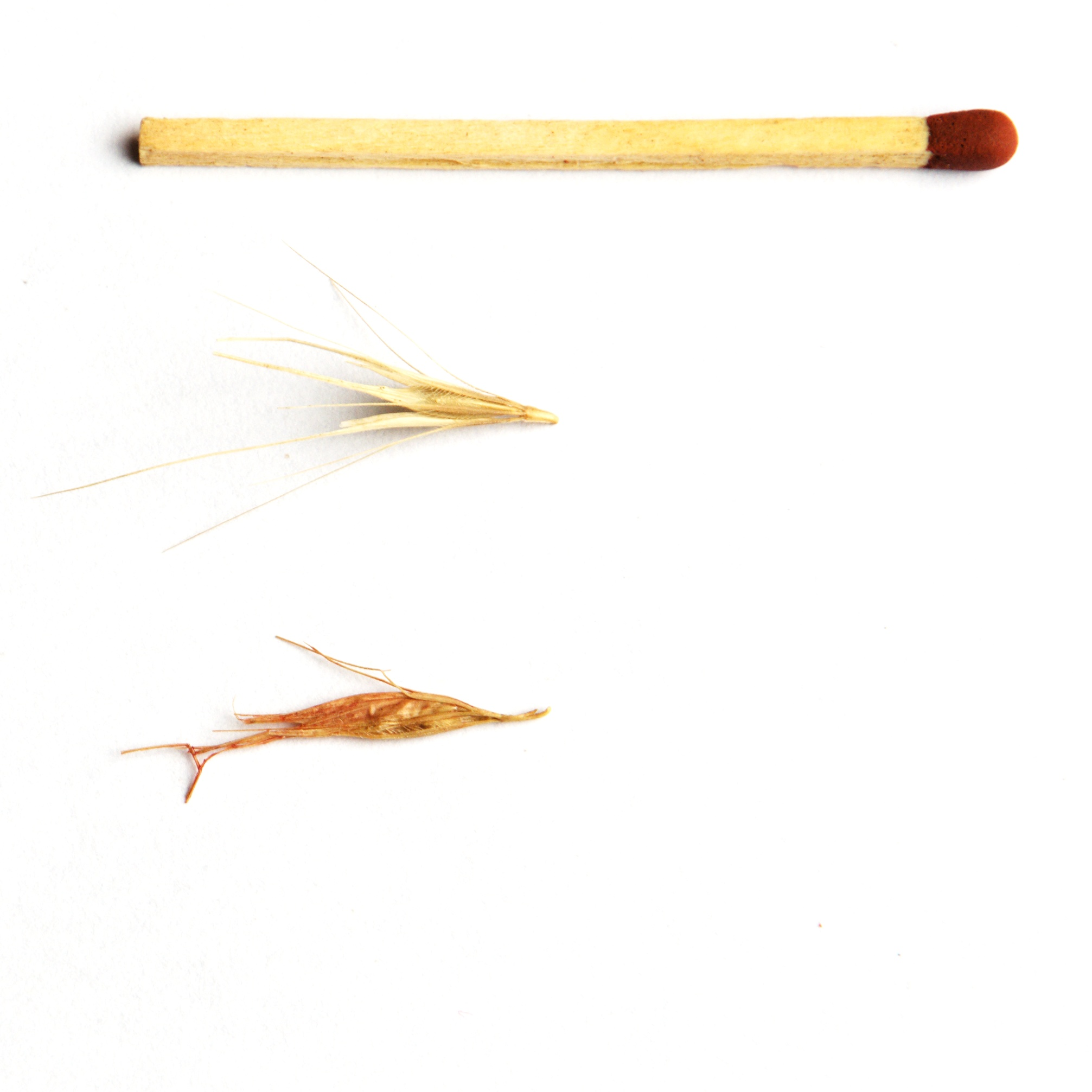 Osina, původní a osina vyndaná ze zanícené rány psa